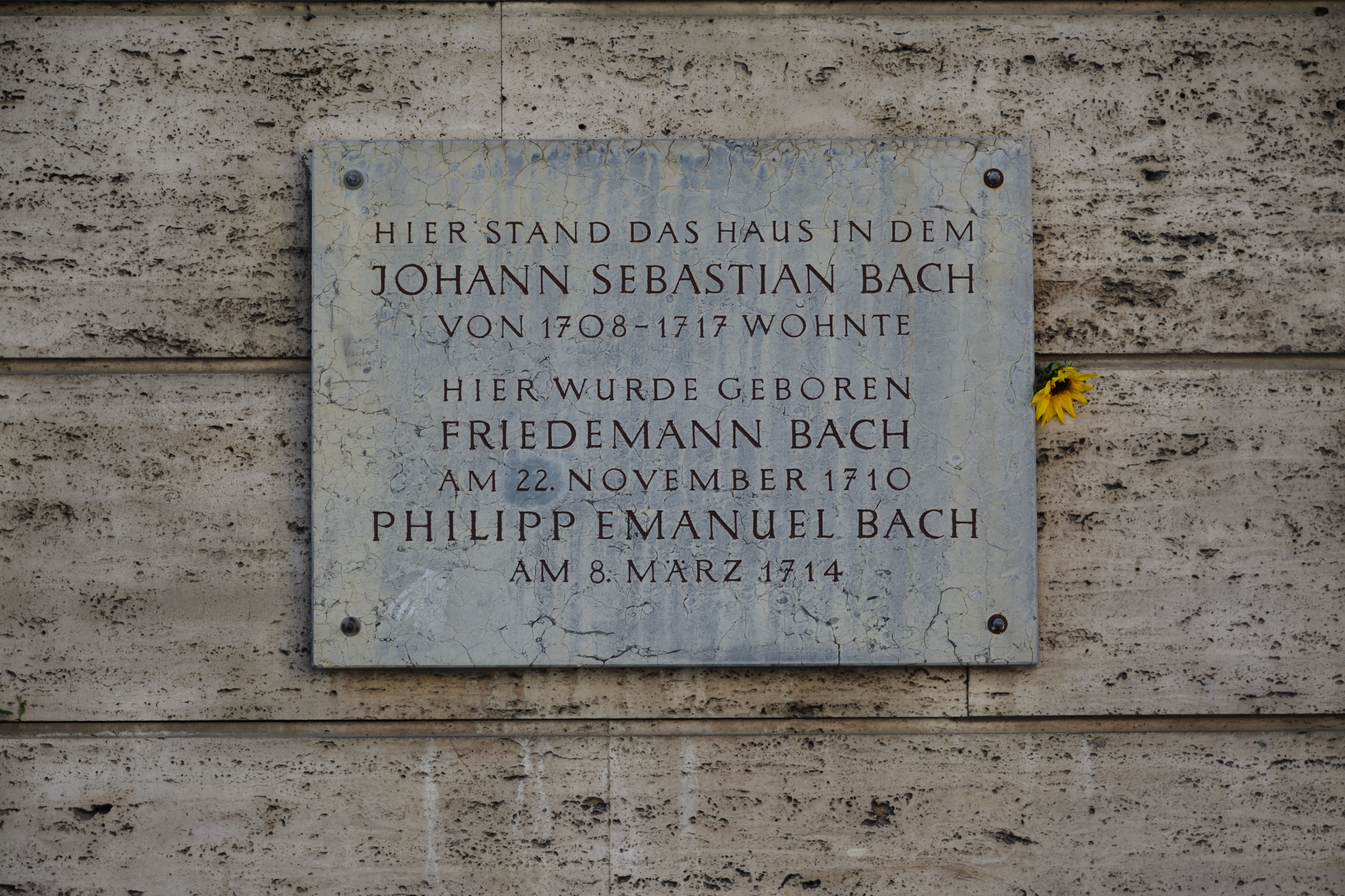 Gedenktafel, Johann Sebastian Bach, Wilhelm Friedemann Bach, Carl Philipp Emanuel Bach, Markt 18, Weimar, Deutschland. Auf der Tafel wurde das Geburtsdatum von Wilhelm Friedemann Bach korrigiert.